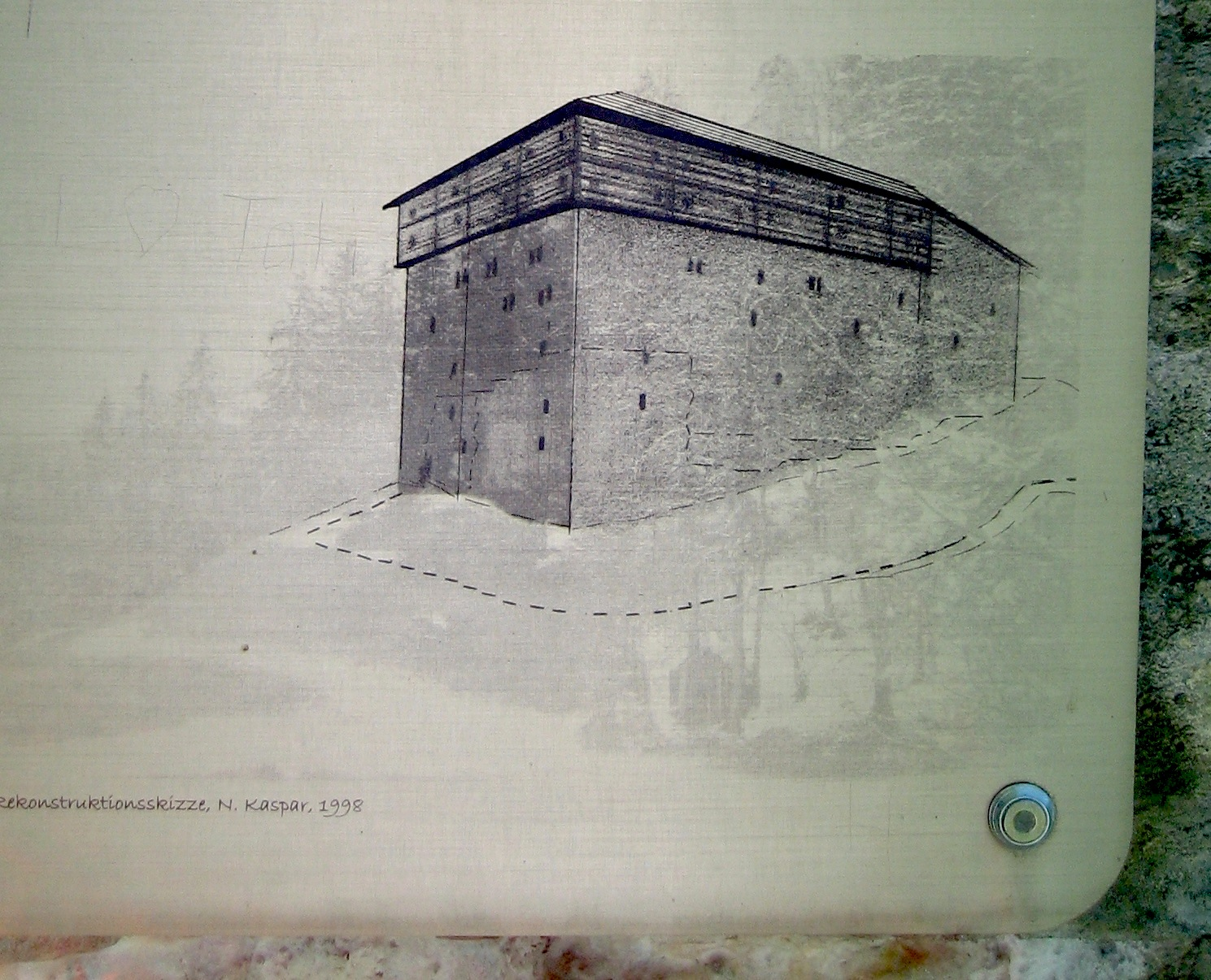 Ausschnitt der Infotafel